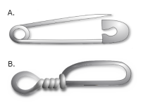 Agrafka.png